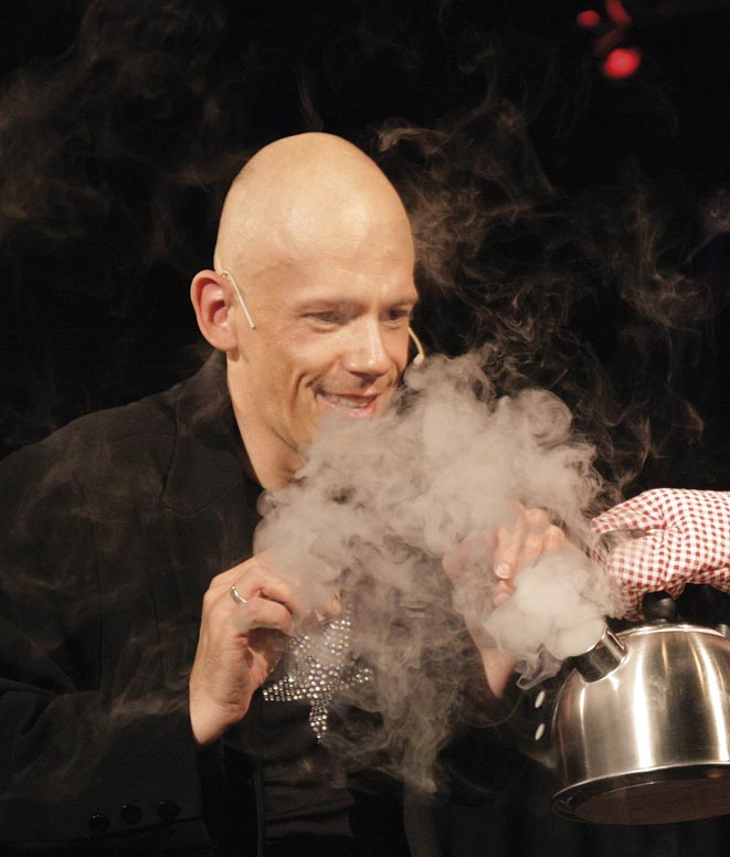 Der Zauberkünstler Ully Loup